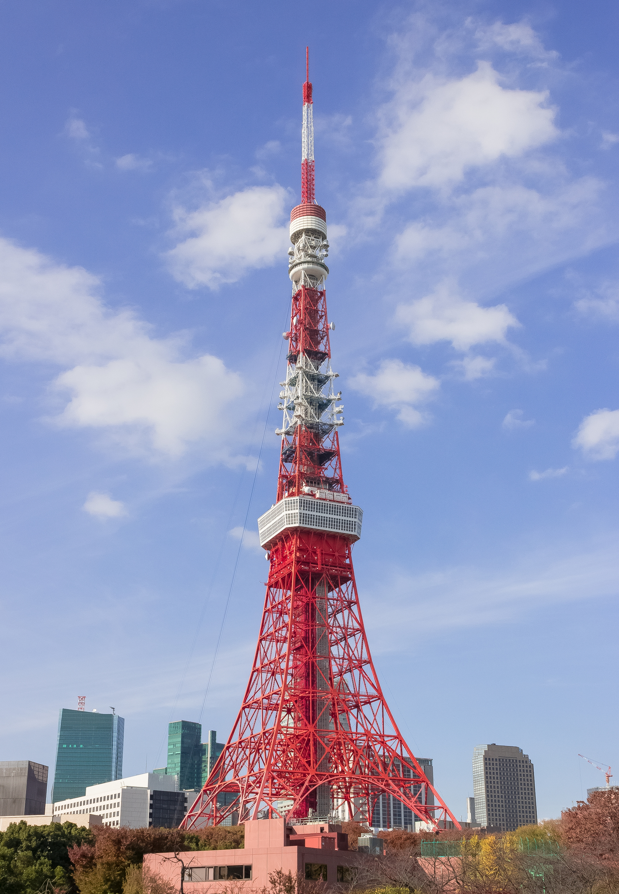 東京タワー。